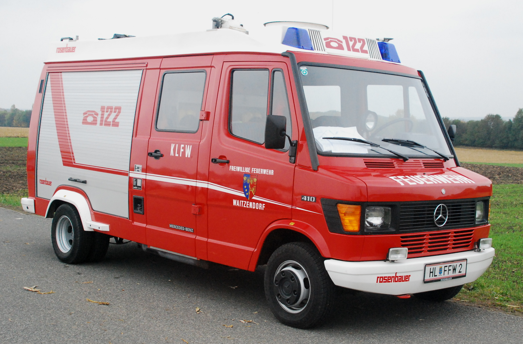 Kleinlöschfahrzeug mit Wasser der FF Waitzendorf in Niederösterreich im Einsatz beim Kürbisfest in Obermarkersdorf in Niederösterreich am 29. Oktober 2011